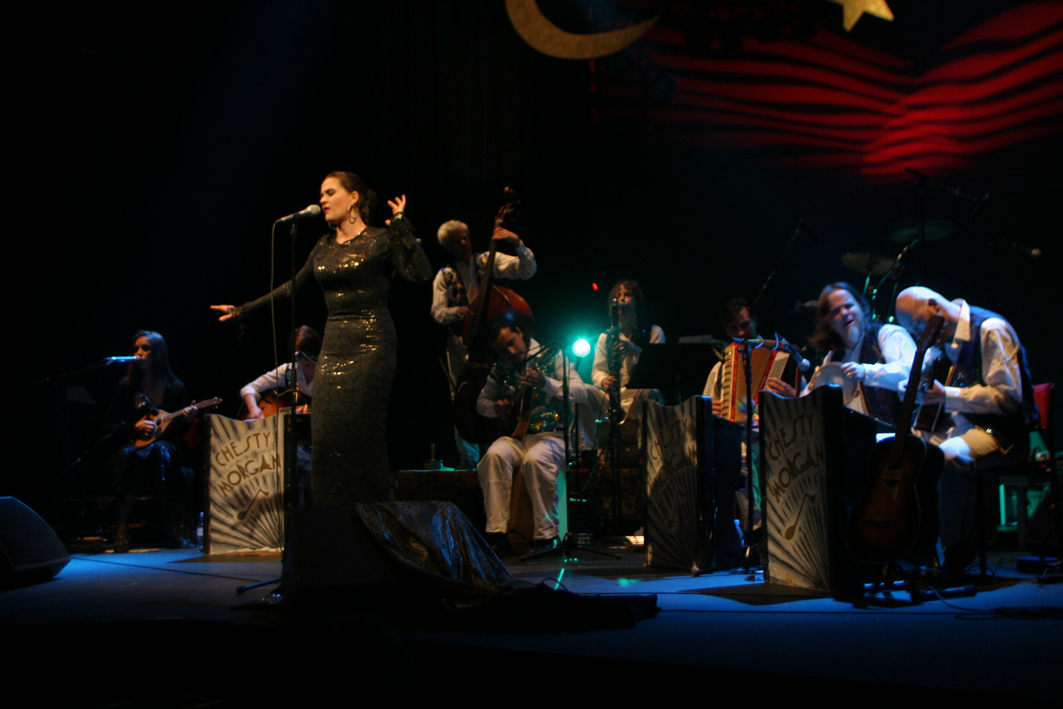 Orkester Chesty Morgan på Södra Teatern